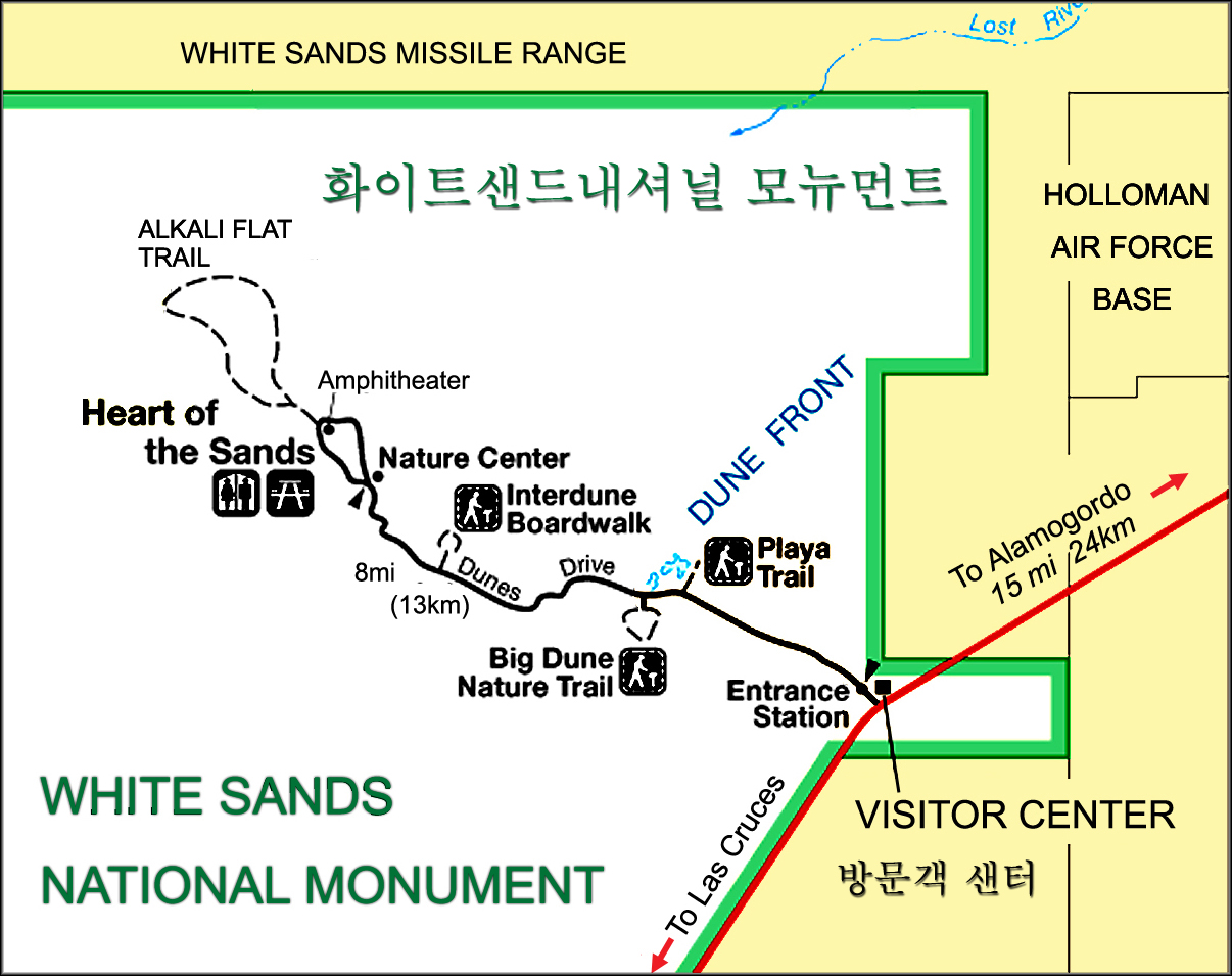 White Sands NAtional Monument Map